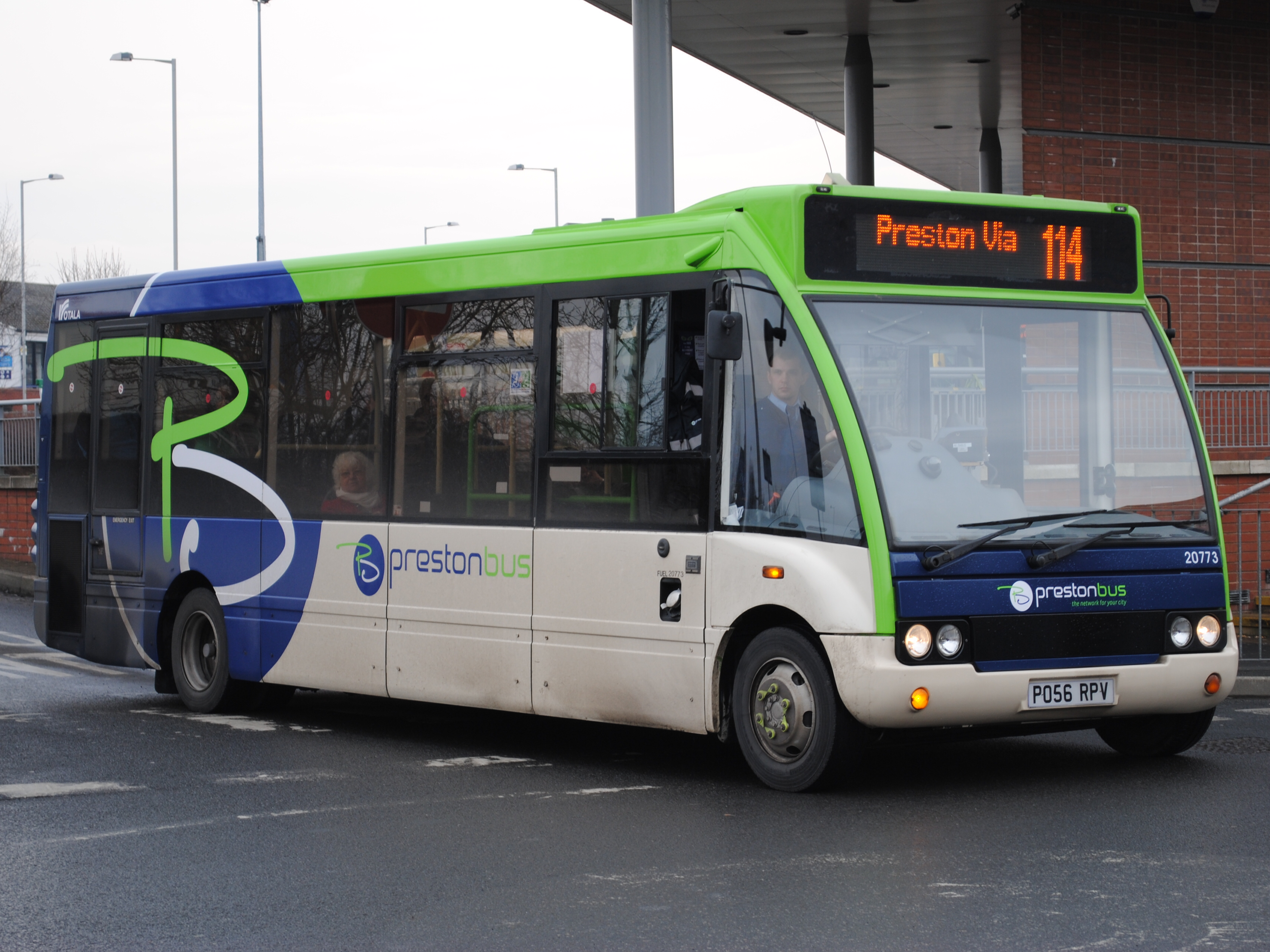 Optare Solo M850